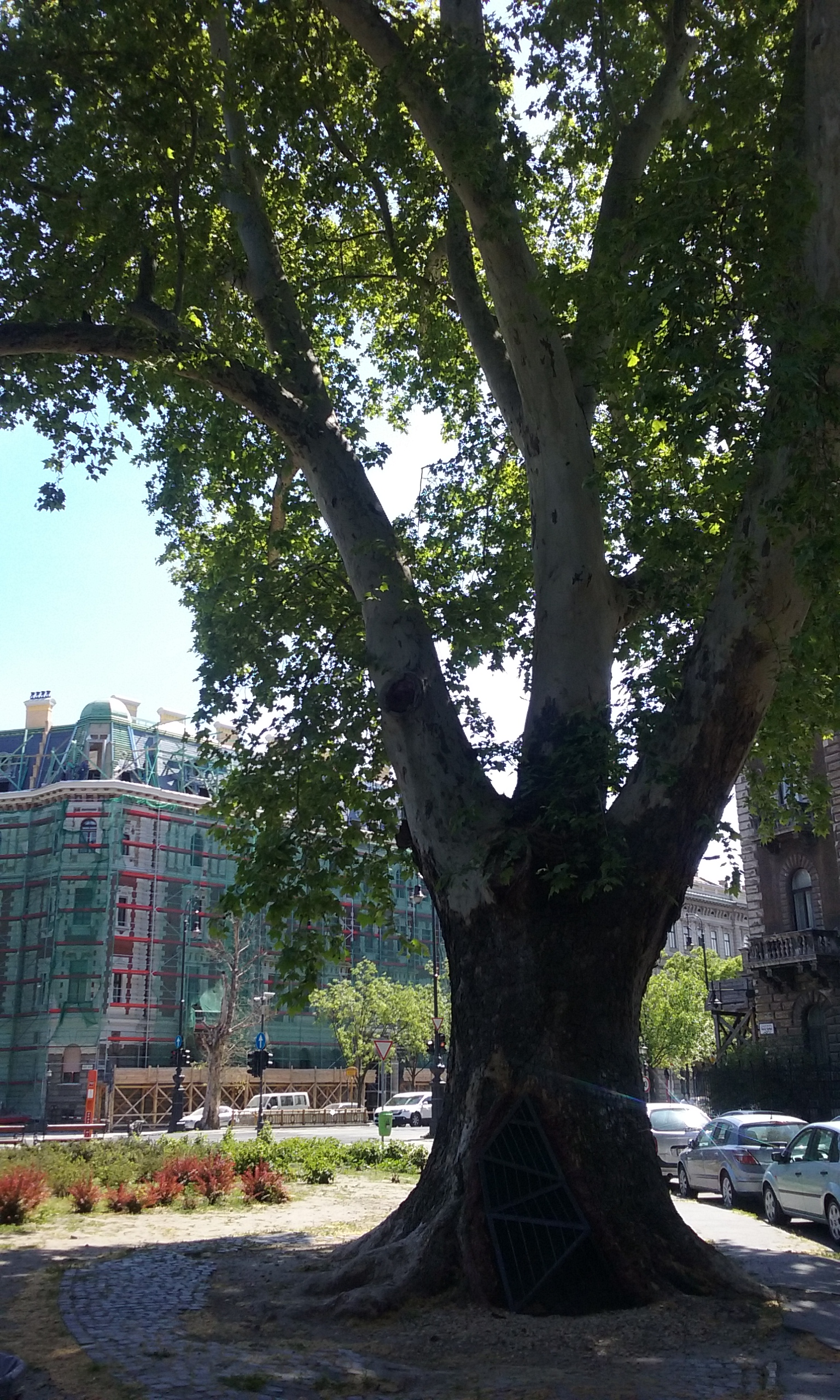 Budapest, Kodály körönd, 150 éves platánfa